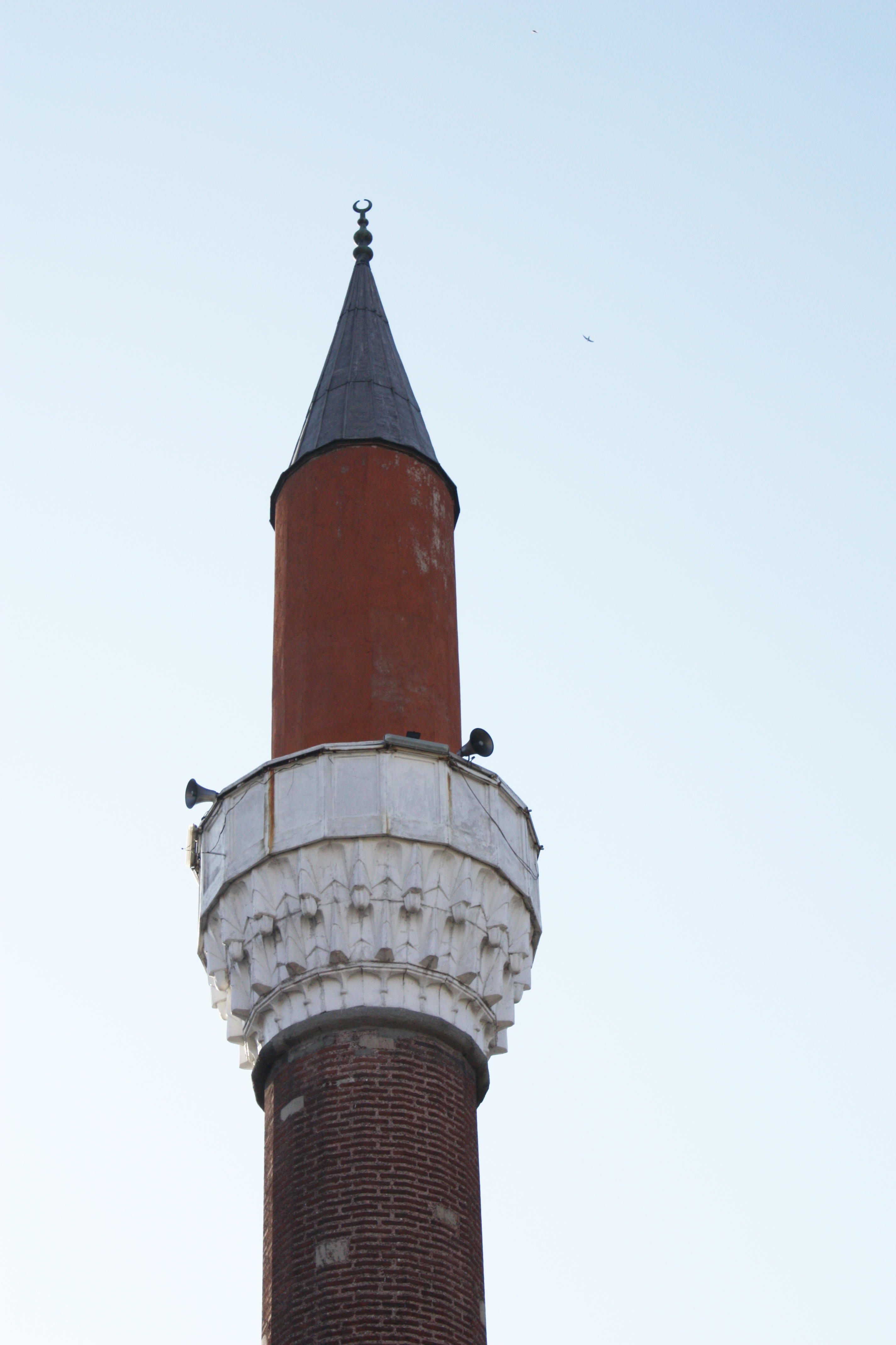 Banya Bashi Mosque, Sofia, Bulgaria, Moschee im Zentrum von Sofia